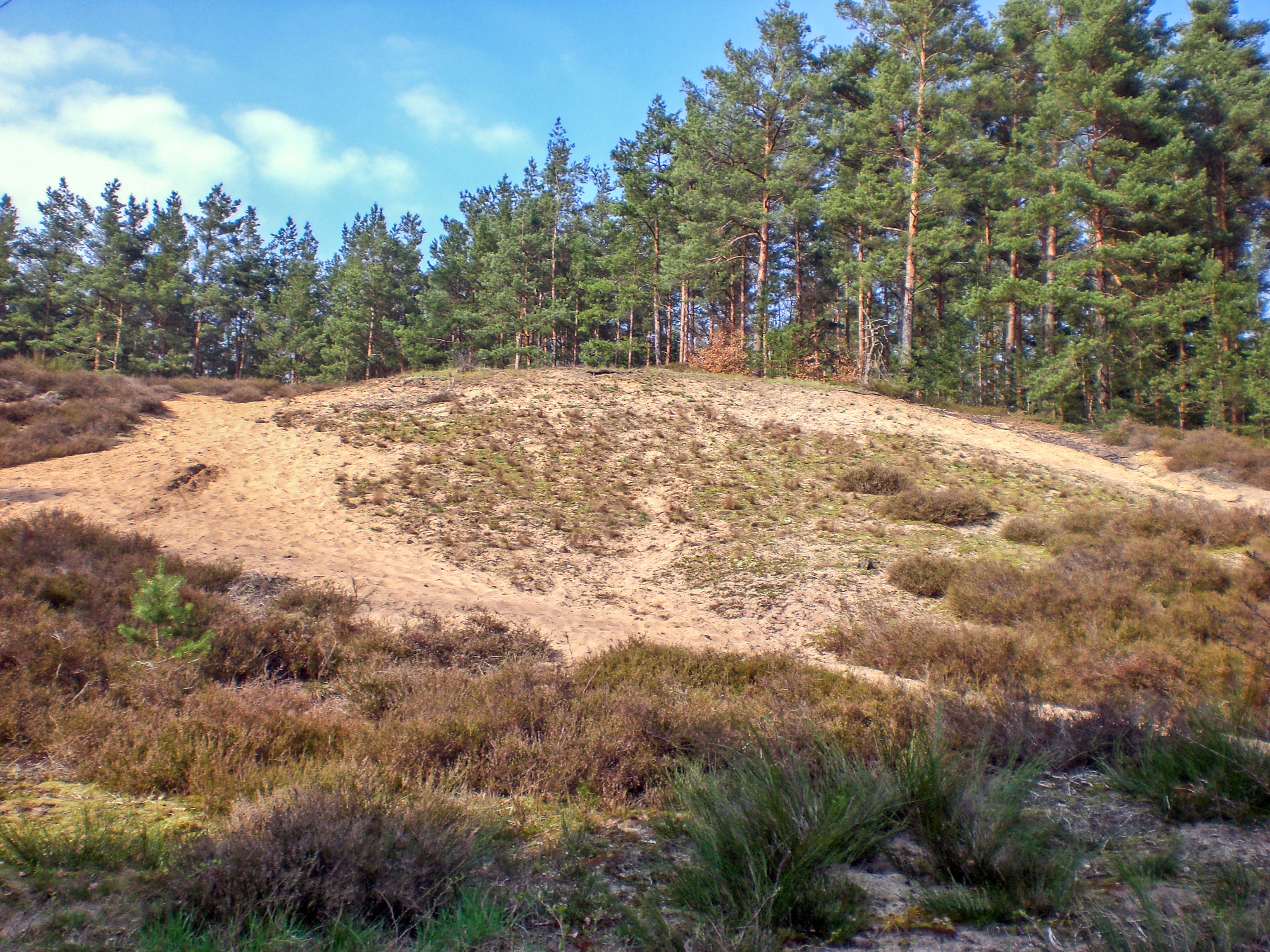 Flechten-Kiefernwälder südlich Leinburg